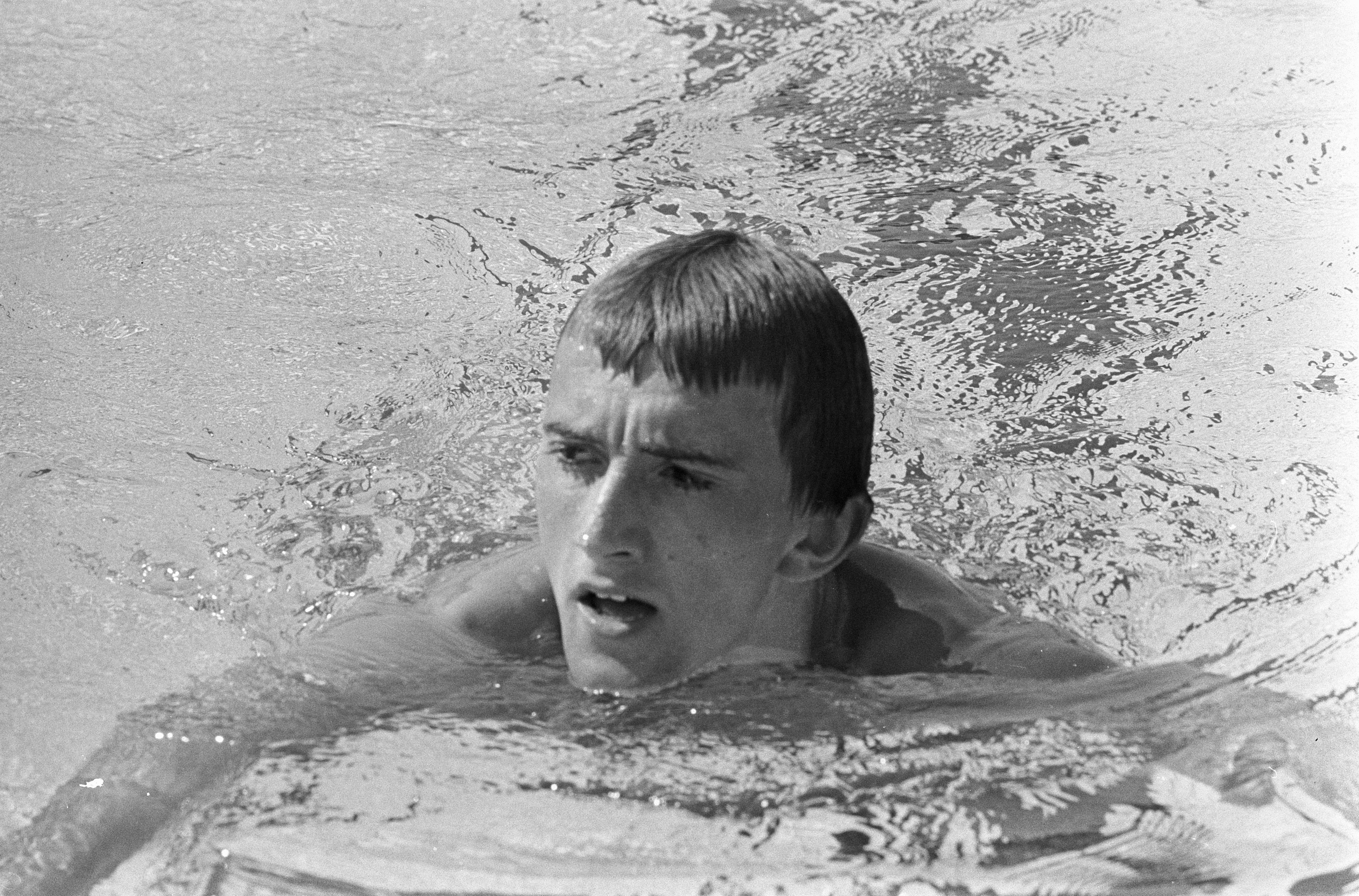 Collectie / Archief : Fotocollectie Anefo Reportage / Serie : [ onbekend ] Beschrijving : Europese Zwemkampioenschappen, Andrei Dunaev (Rusland) aktie Datum : 23 augustus 1966 Locatie : Utrecht Trefwoorden : sport, zwemmen Fotograaf : Kroon, Ron / Anefo Auteursrechthebbende : Nationaal Archief Materiaalsoort : Negatief (zwart/wit) Nummer archiefinventaris : bekijk toegang 2.24.01.05 Bestanddeelnummer : 919-4772